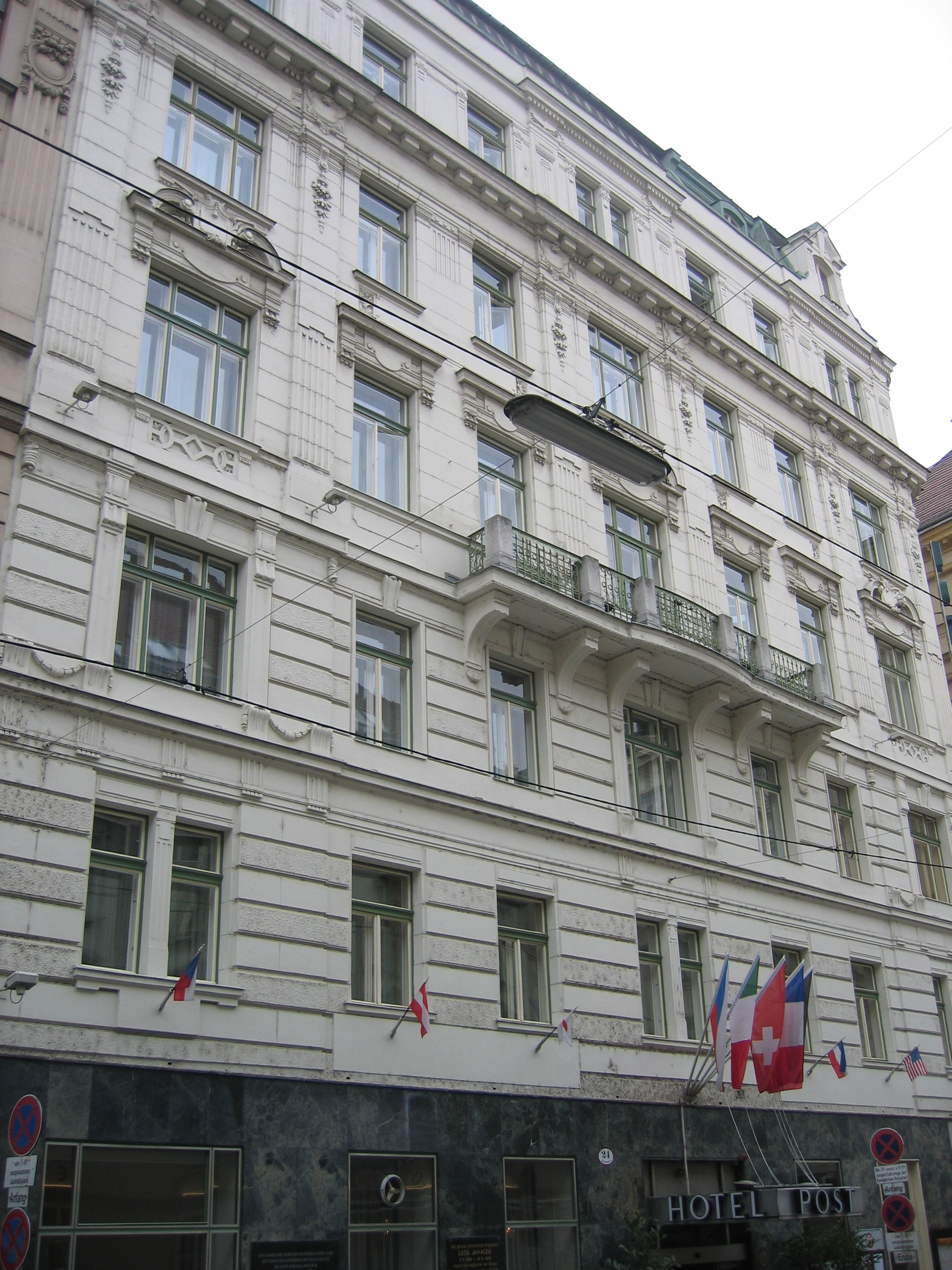 Das Gebäude des Hotels Post und der Wiener Kammeroper in Wien